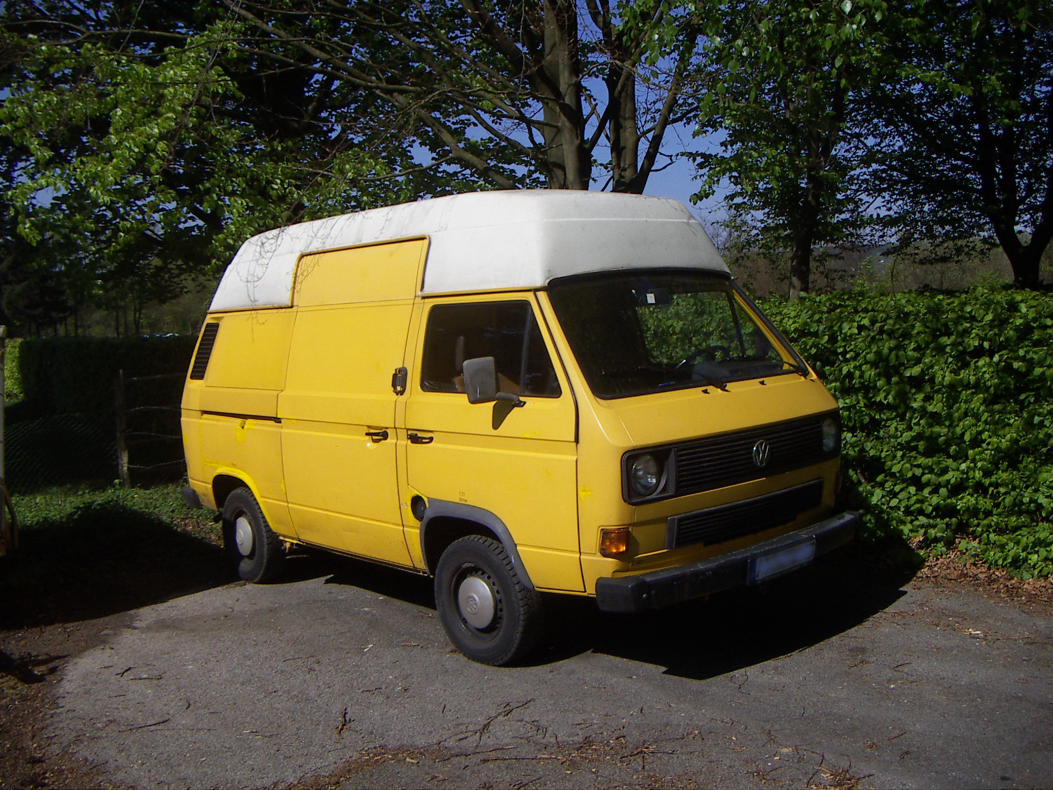 Ehemaliges Transportfahrzeug der Deutschen Post, Hochdach kunststoff